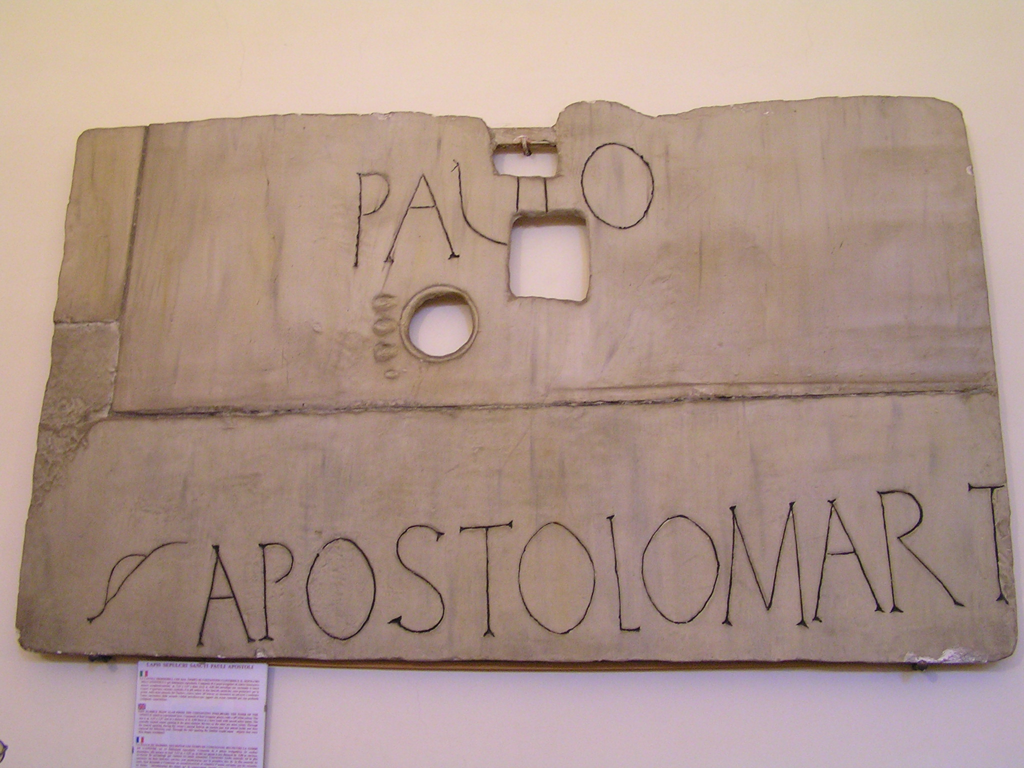 Кришка гробу апостола Павла